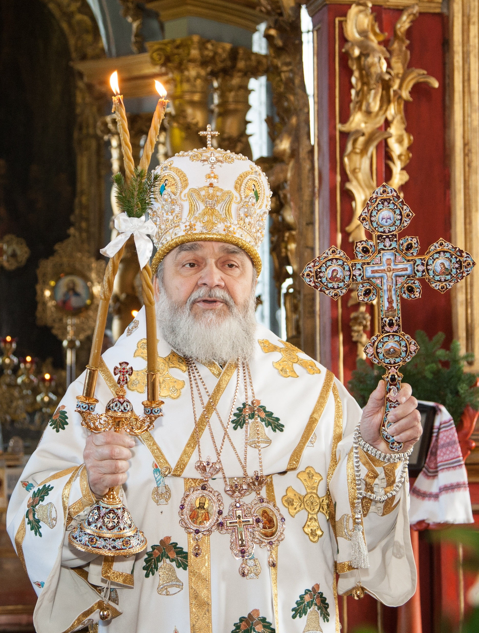 Митрополит Мефодій в Андрійївській церкві на Різдвяному богослужінні 6 січня 2015 року